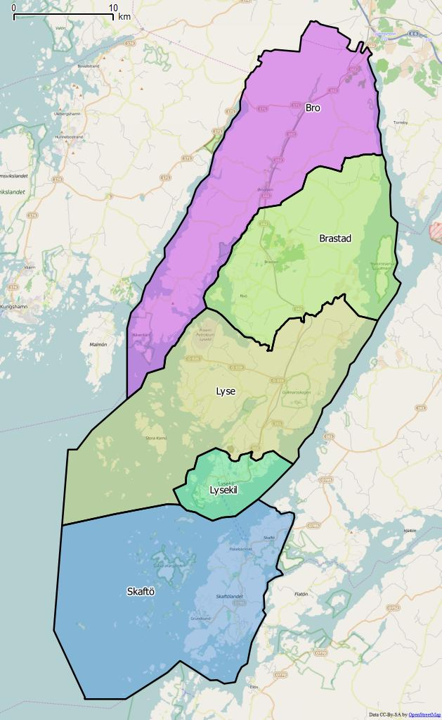 Distriktsindelningen i Lysekils kommun World file: 70.85583495367809803 0 0 -70.85583495367809803 1251123.14019299694336951 8074337.06853502709418535